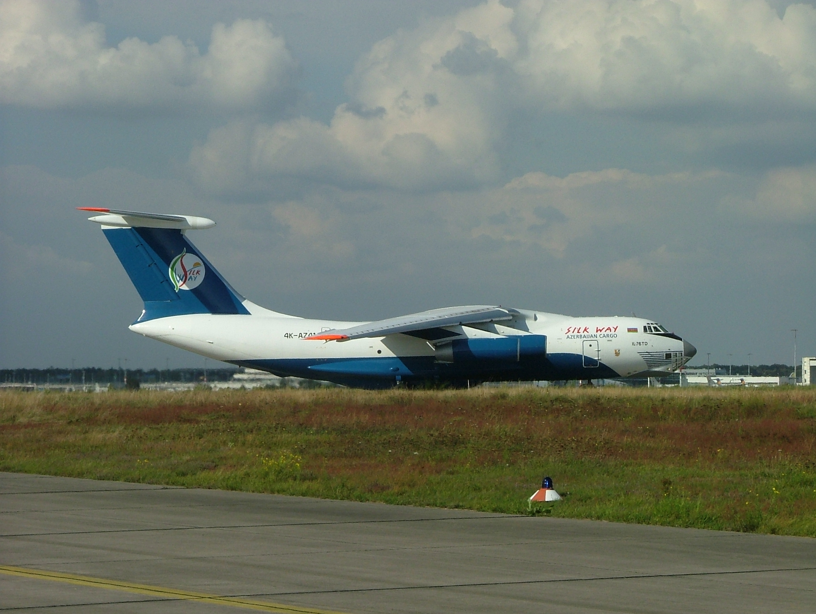 Iljuschin Il-76TD in Cologne